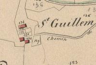 Sant Guillem de Combret, del Tec, en el Cadastre napoleònic del 1812 (Arxius Departamentals dels Pirineus Orientals)